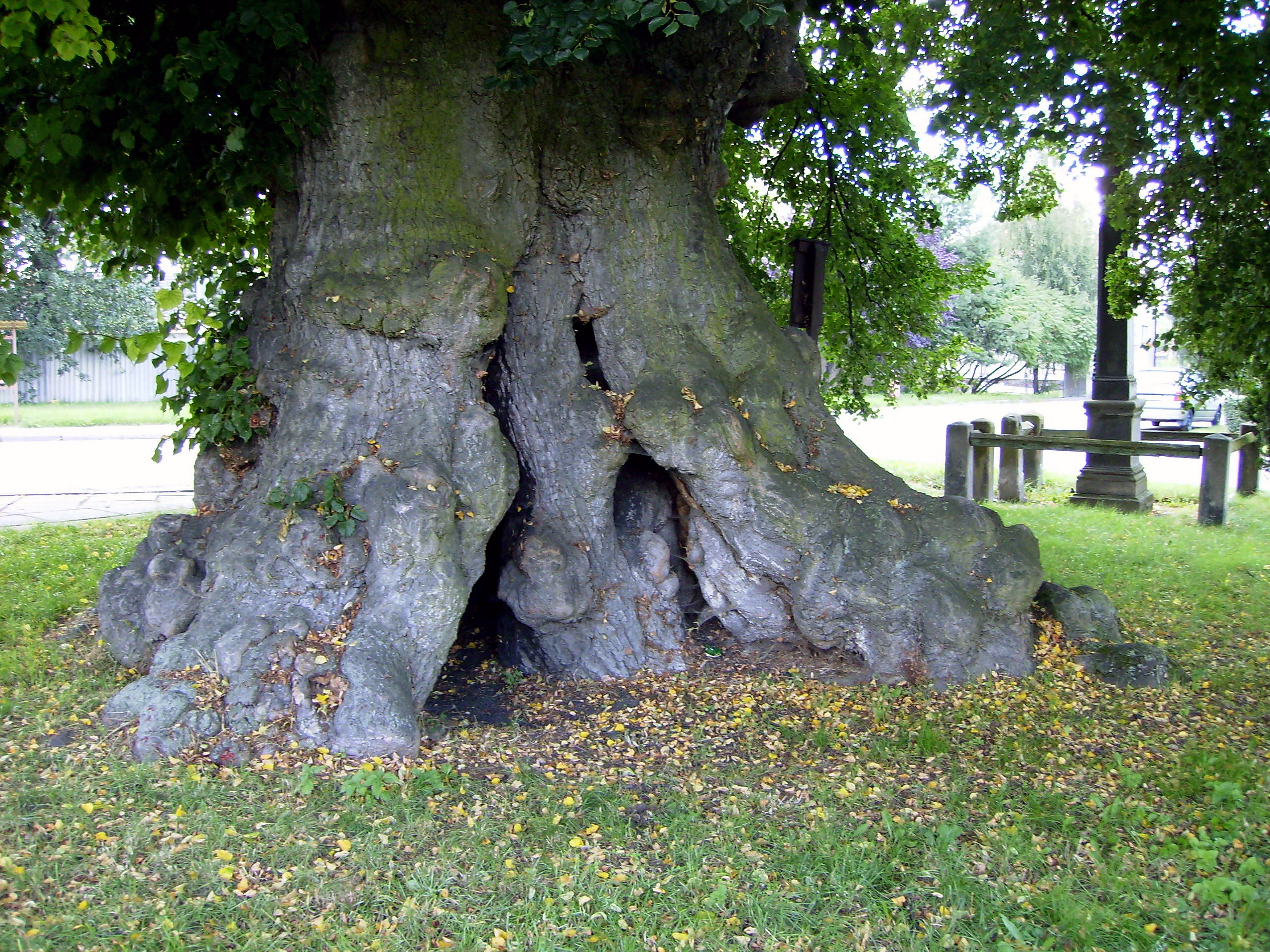 Pamatna lipa ve stredoceske Stare Lyse - kmen.